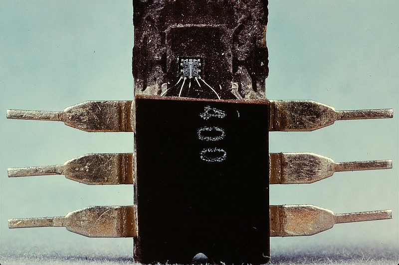 Original image description from the Deutsche Fotothek Elektronikbausteine